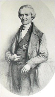 Mathieu Leclercq, ministre de la Justice belge